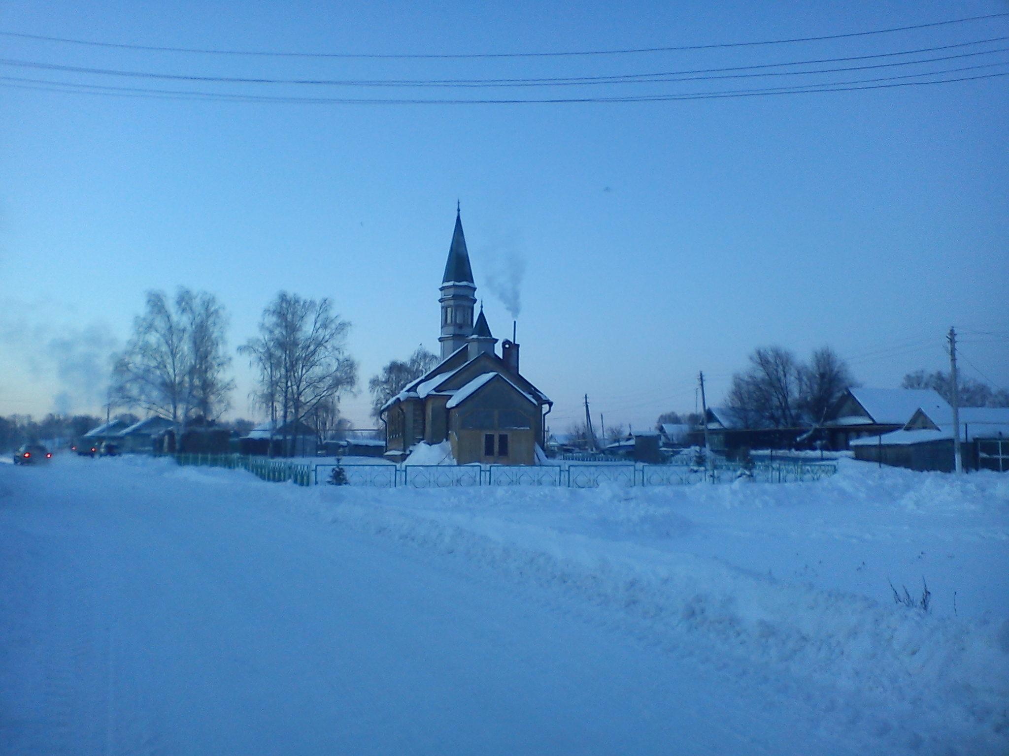 Мечеть в Биектау